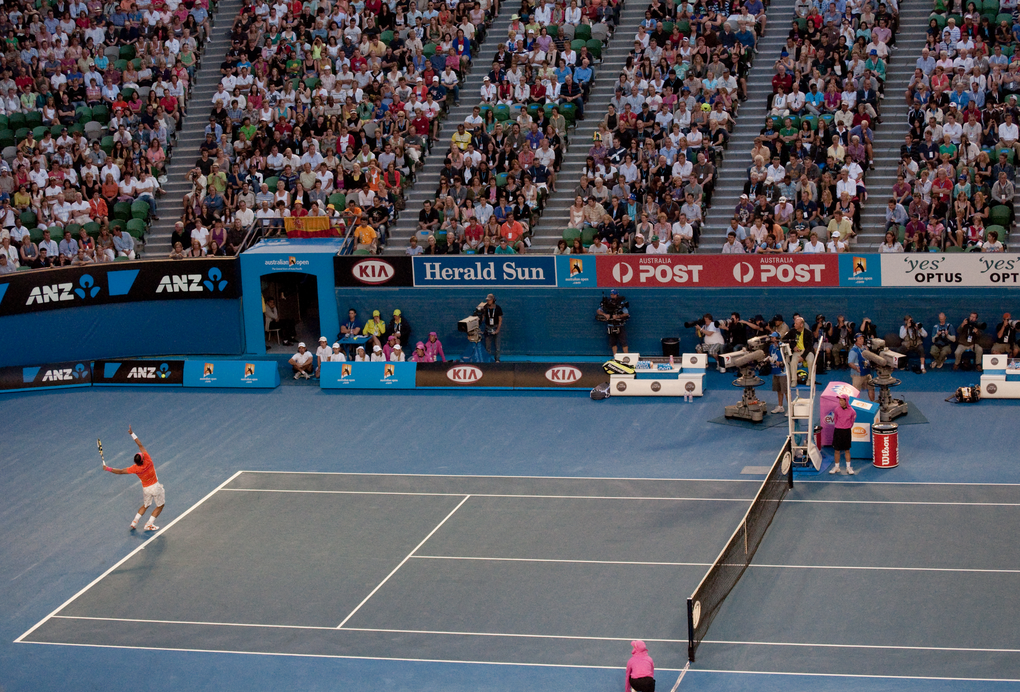 Australian Open 2010 Quarterfinals Nadal Vs Murray